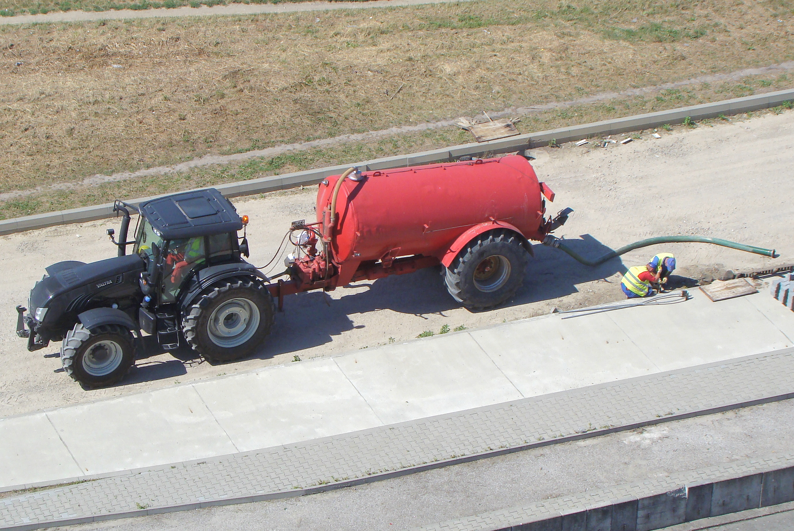 Wykonywanie asenizacji.